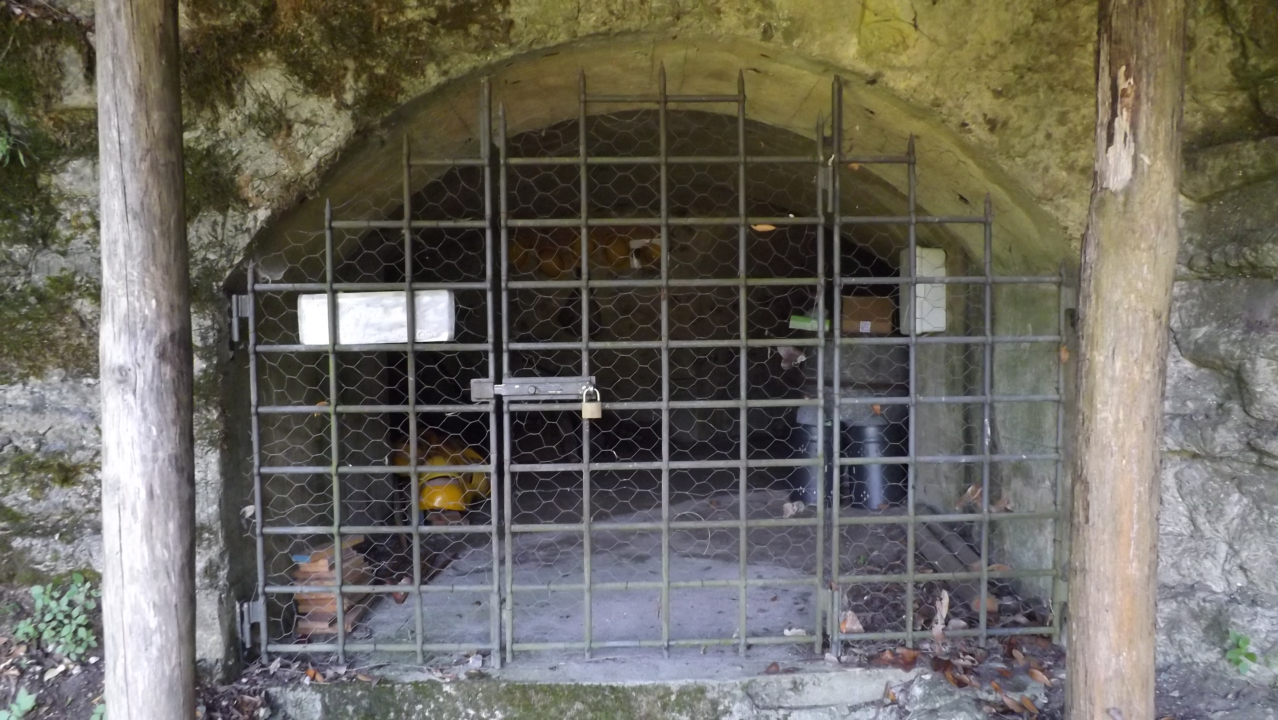 Ingresso fortificazioni Linea Gotica Anchiano, Borgo a Mozzano (LU)